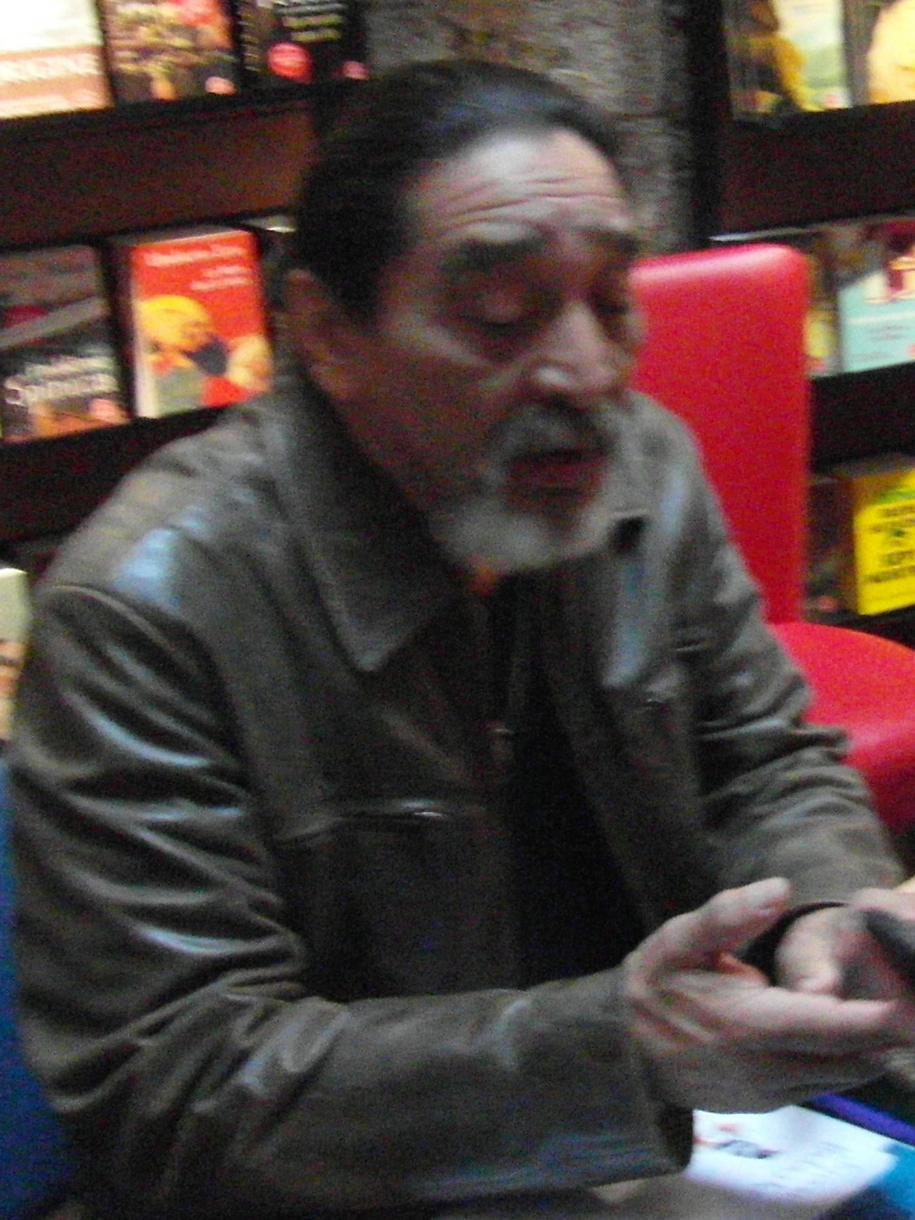 George Aguilar en mars 2019